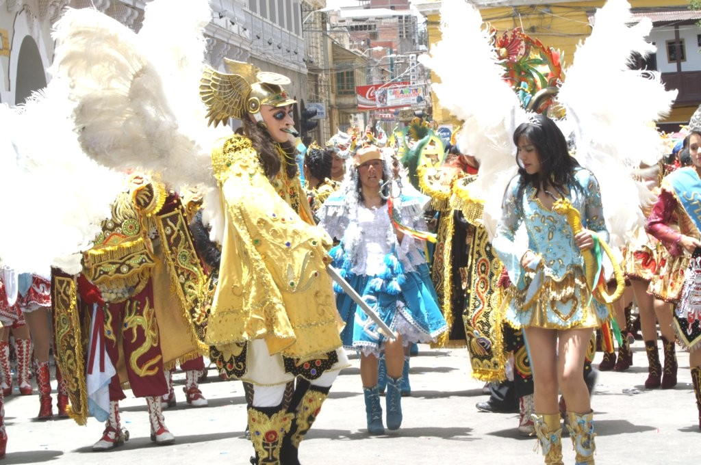 Het Carnaval van Oruro, Bolivia, het staat sinds 2001 vermeld op de Lijst van Meesterwerken van het Orale en Immateriële Erfgoed van de Mensheid van UNESCO.